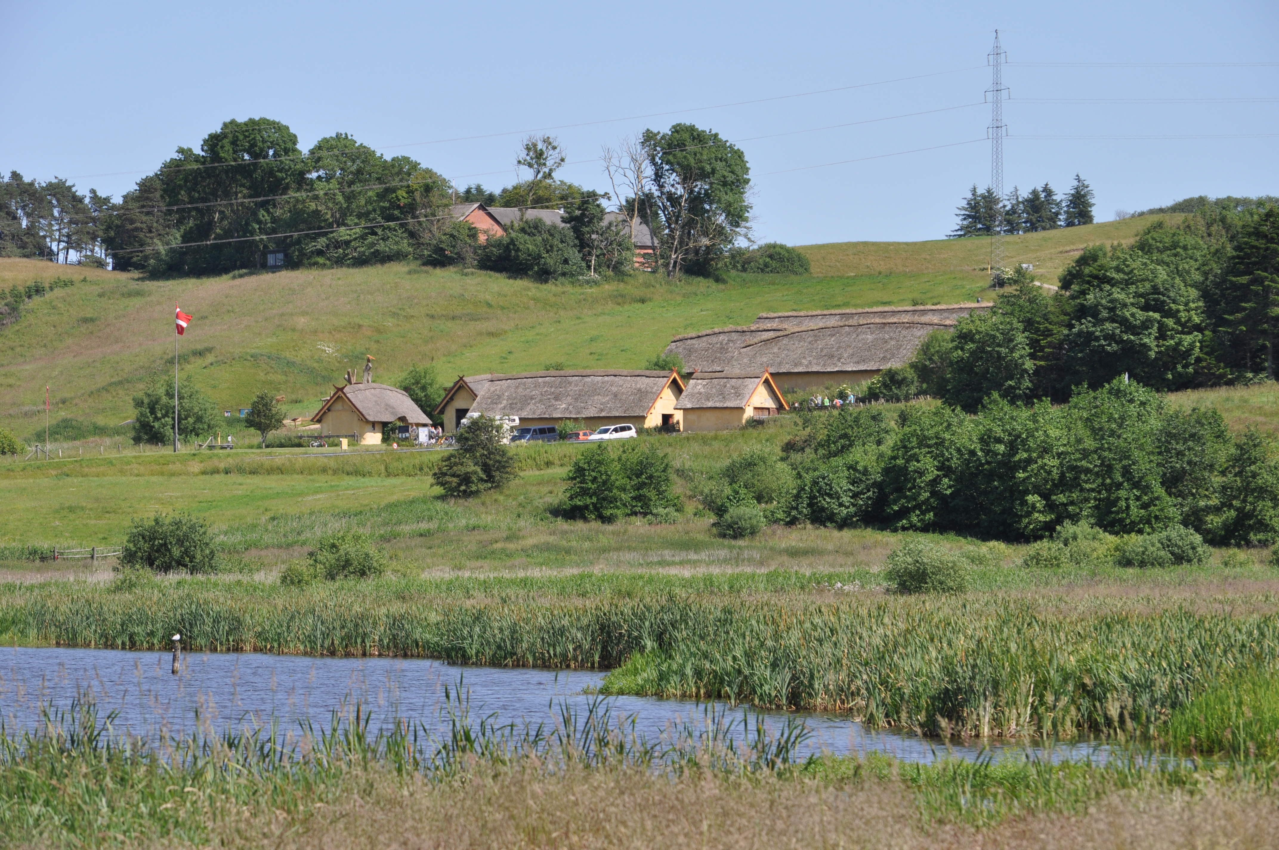 Fyrkat viking center